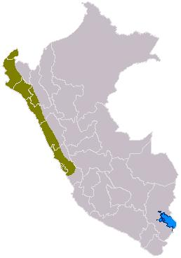 Mapa_cultura_chimu.jpg